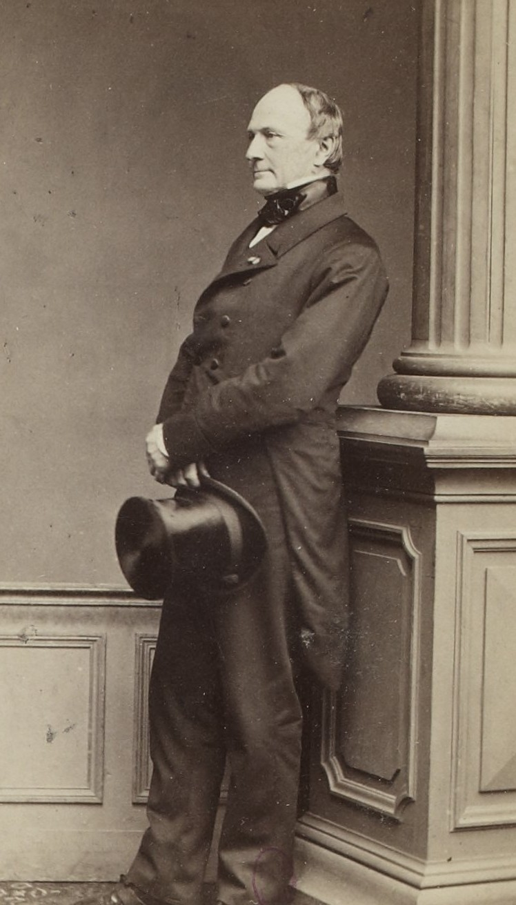 Personnalités françaises et étrangères sous le Second Empire.